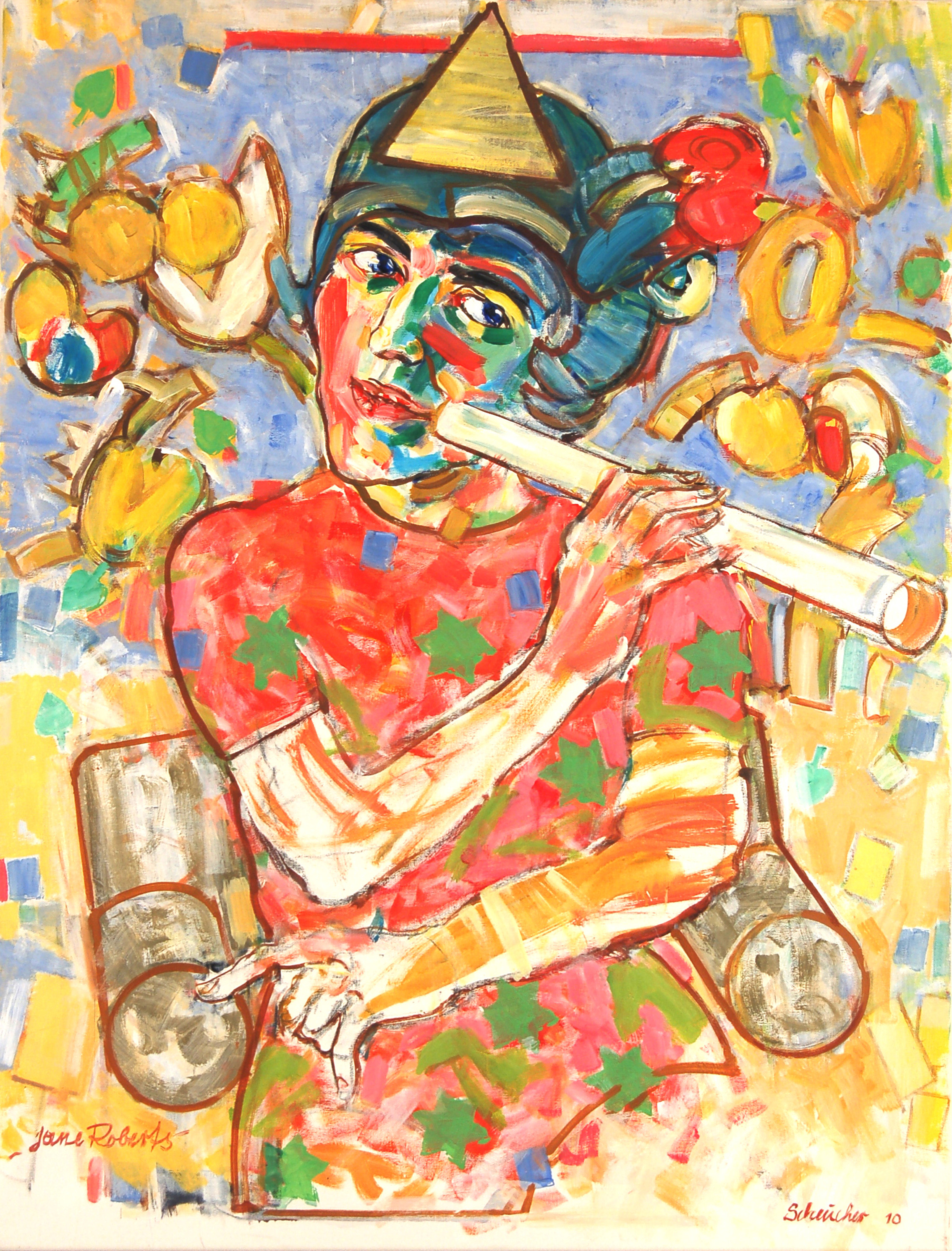 Porträt von Jane Robertstitle QS:P1476,de:"Porträt von Jane Roberts" label QS:Lde,"Porträt von Jane Roberts"